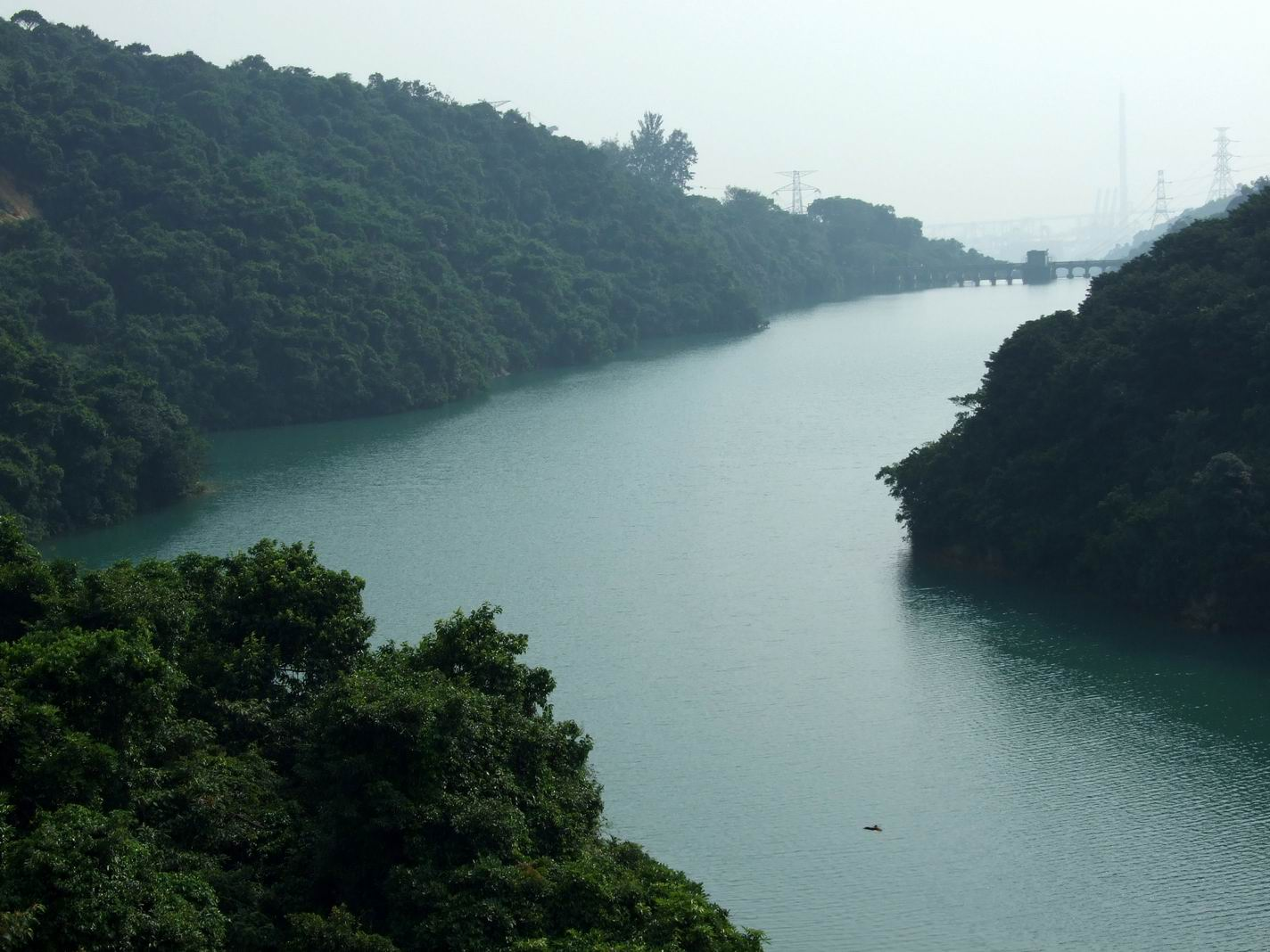 中文（香港）: 九龍副水塘